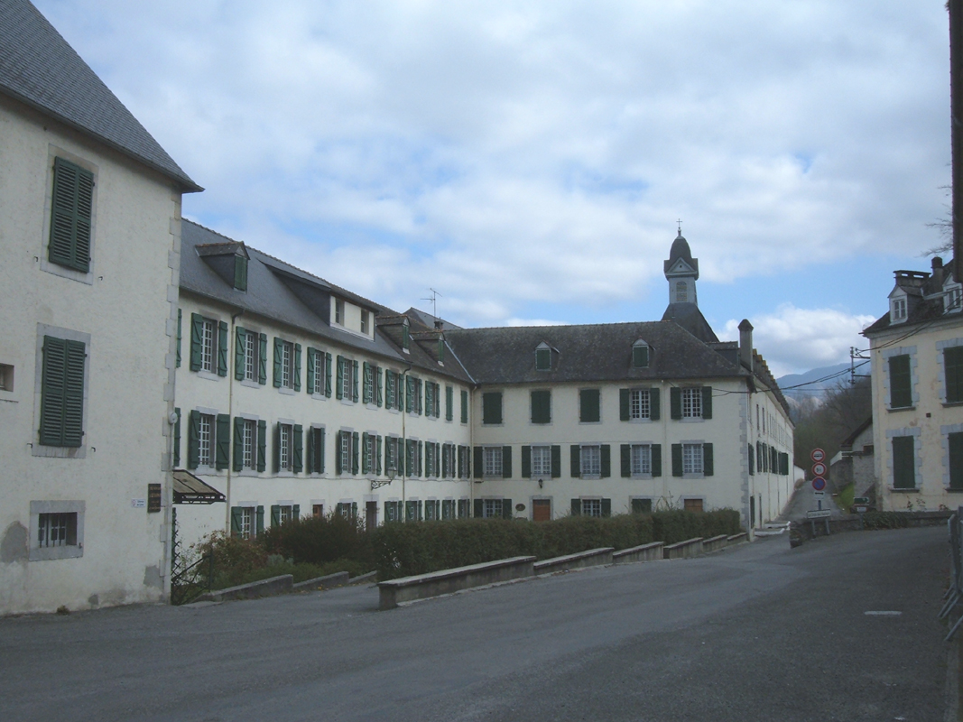 Collegio Notre-Dame di Bétharram, fondato da Michele Garicoits nel 1837. Foto personale.